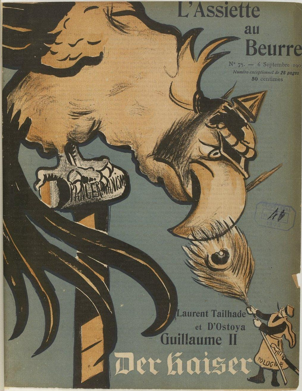 L'Assiette au beurre n° 75 du 6 septembre 1902, dossier « Der Kaiser Guillaume II » composé par Georges d'Ostoya (dessins) et Laurent Tailhade (textes).